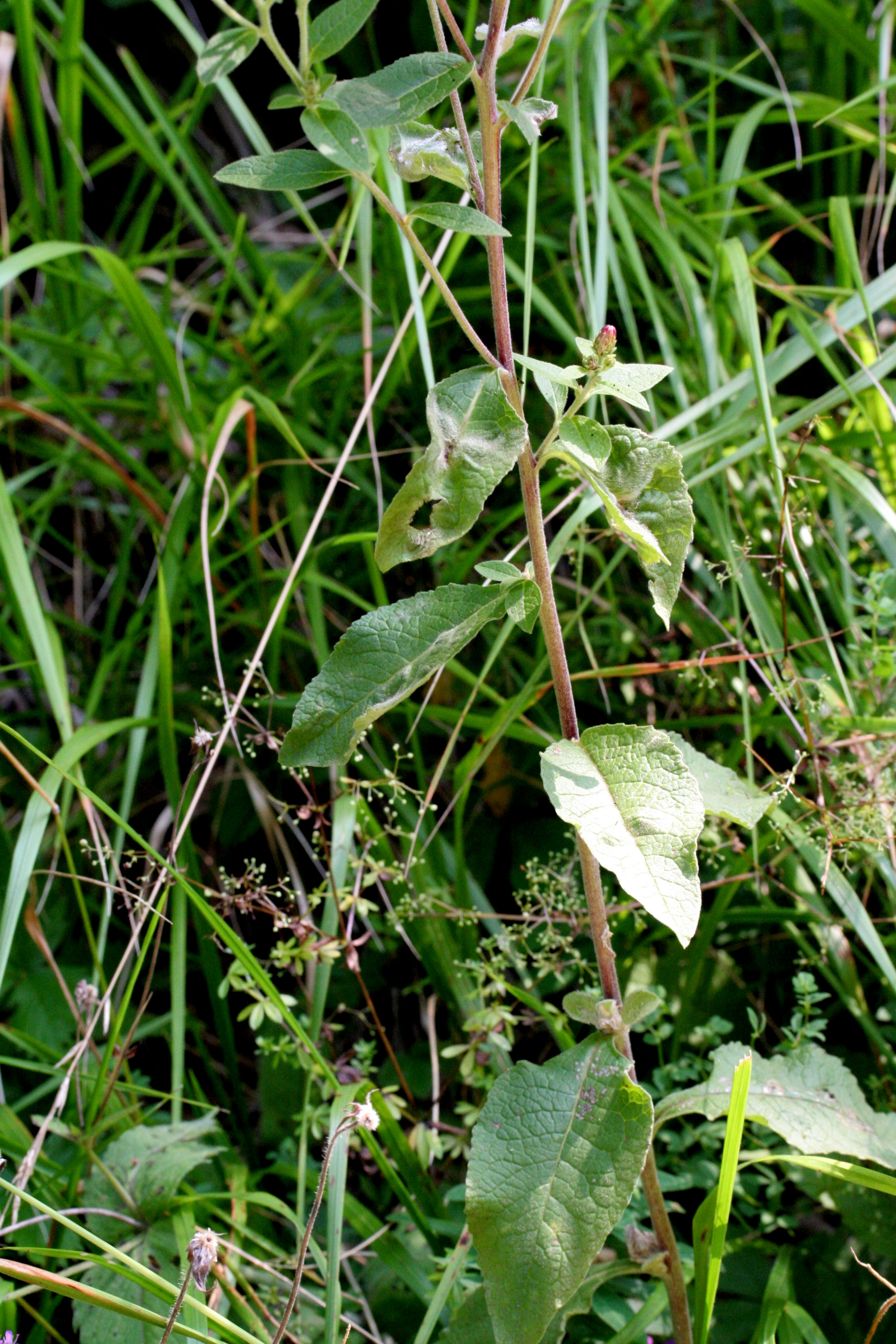 Enula baccherina – Località: Valmorel, Limana (BL), 800 m s.l.m.